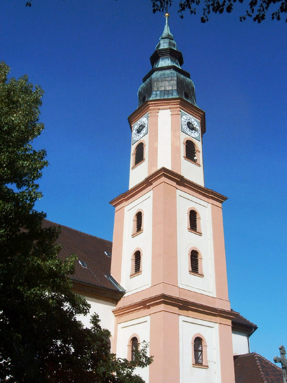 Pfarrkirche St. Martin in Freiburg-Hochdorf